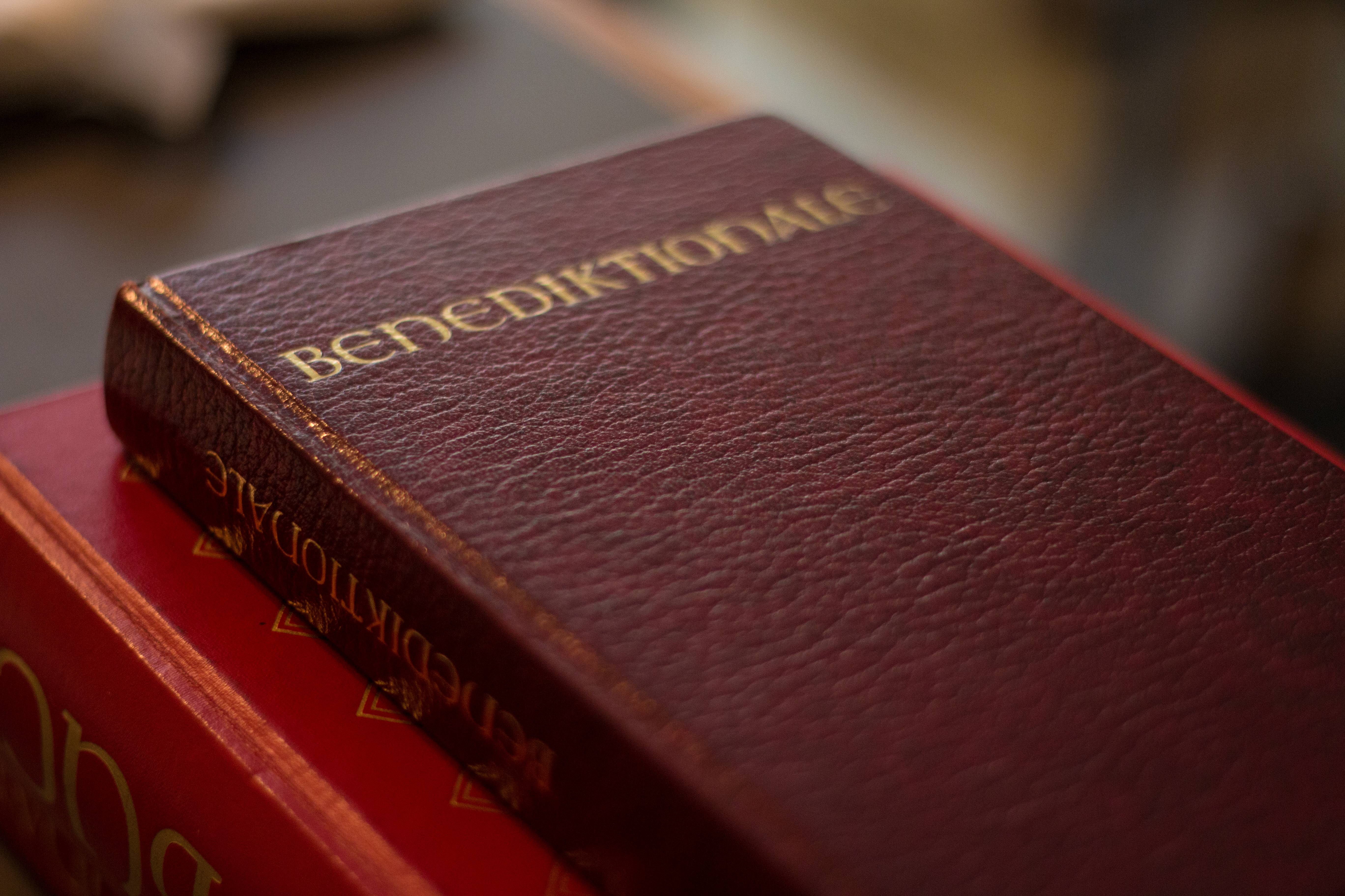 Benediktionale